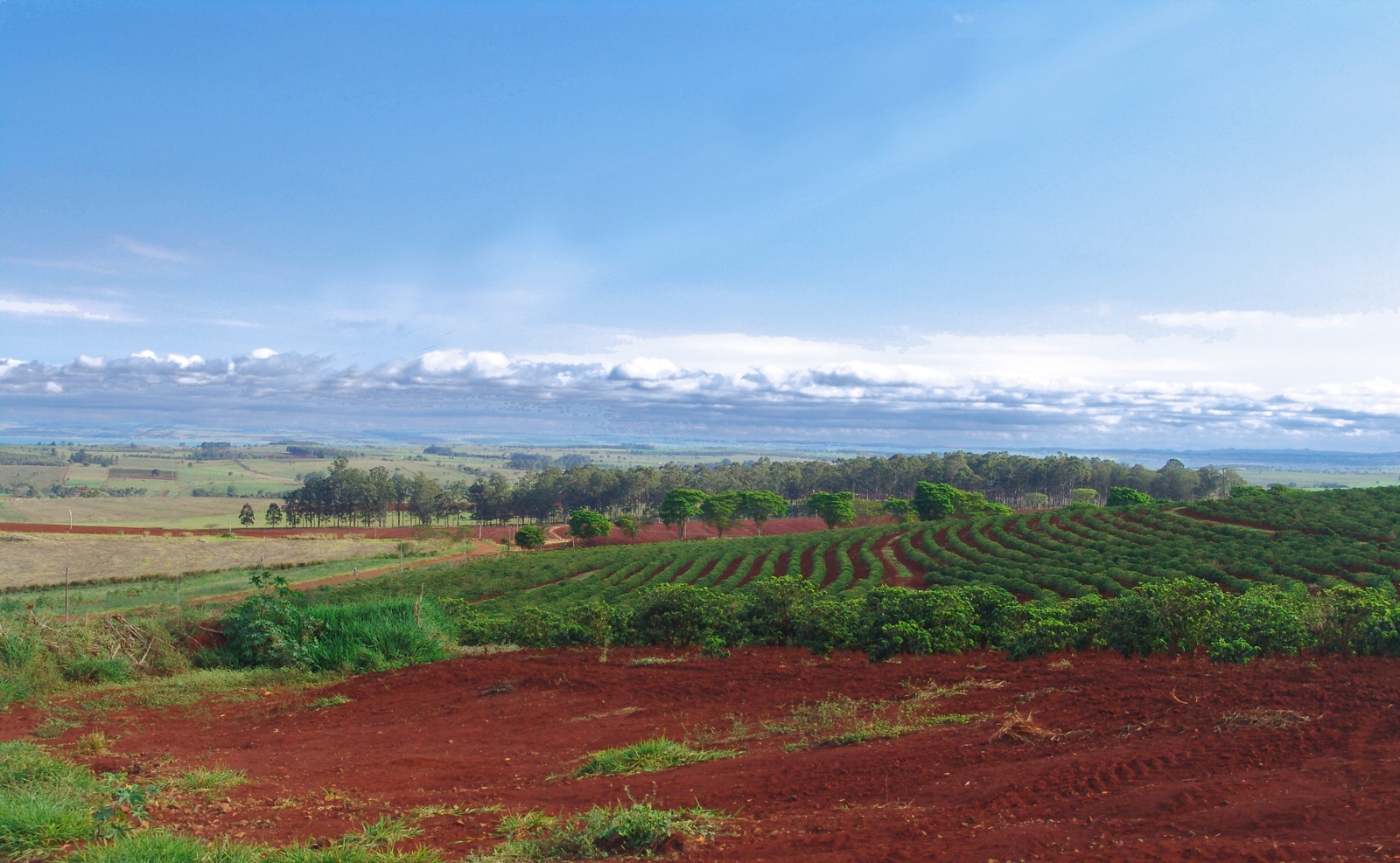 Parte da Fazenda Letreiro (Arandu) - Cafezal - ao fundo Represa de Jurumirim